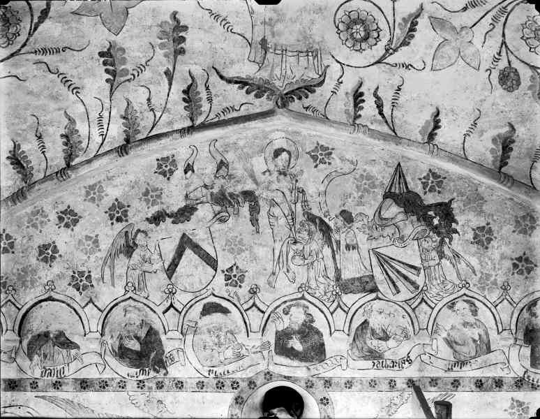 Kalkmålningar, detalj, högkorets västvägg ovanför triumfbågen. Kategori: (03) Kalkmålningar Kalkmålningar, detalj, högkorets västvägg ovanför triumfbågen.